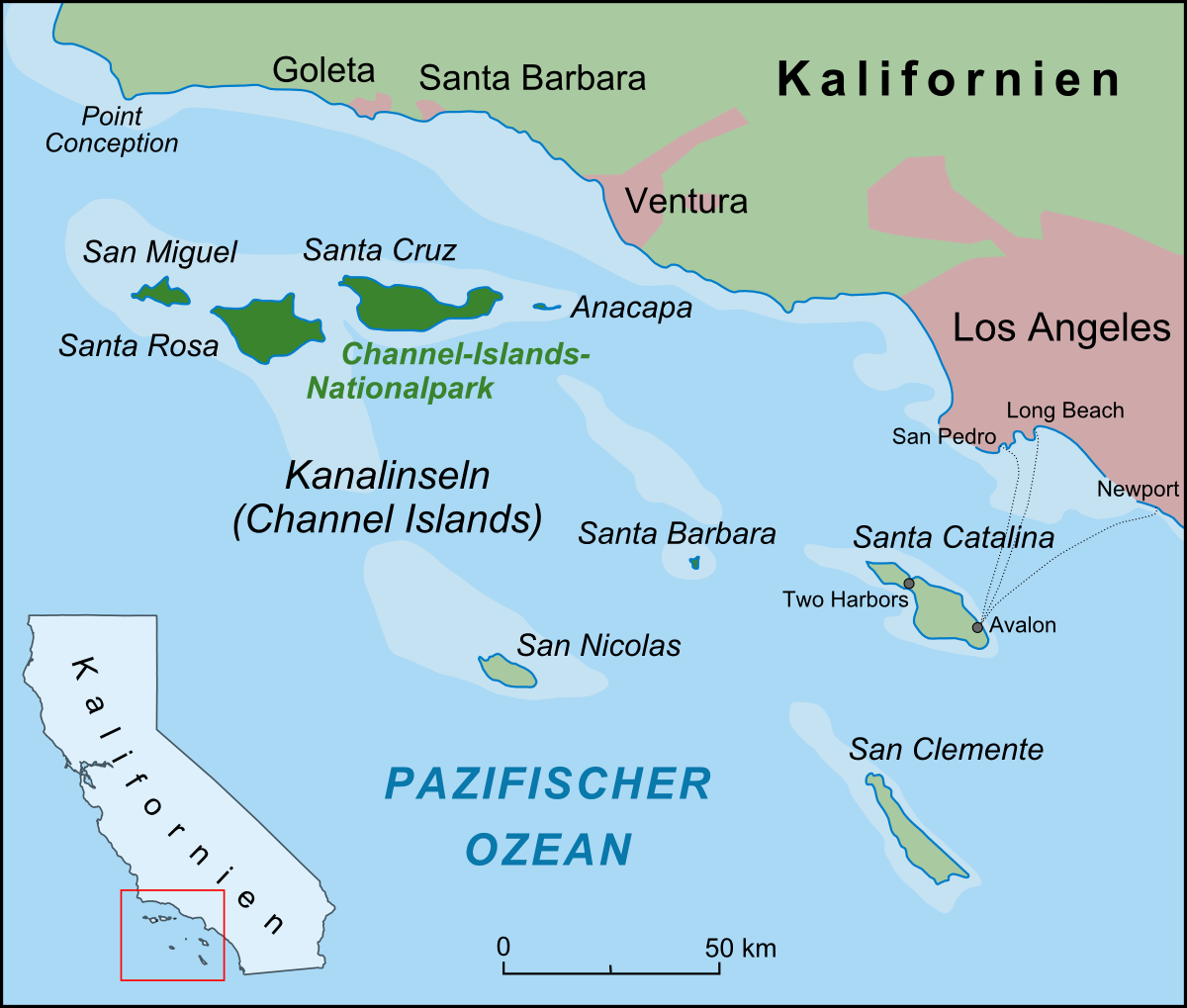 Karte der Kanalinseln vor der Küste Kaliforniens